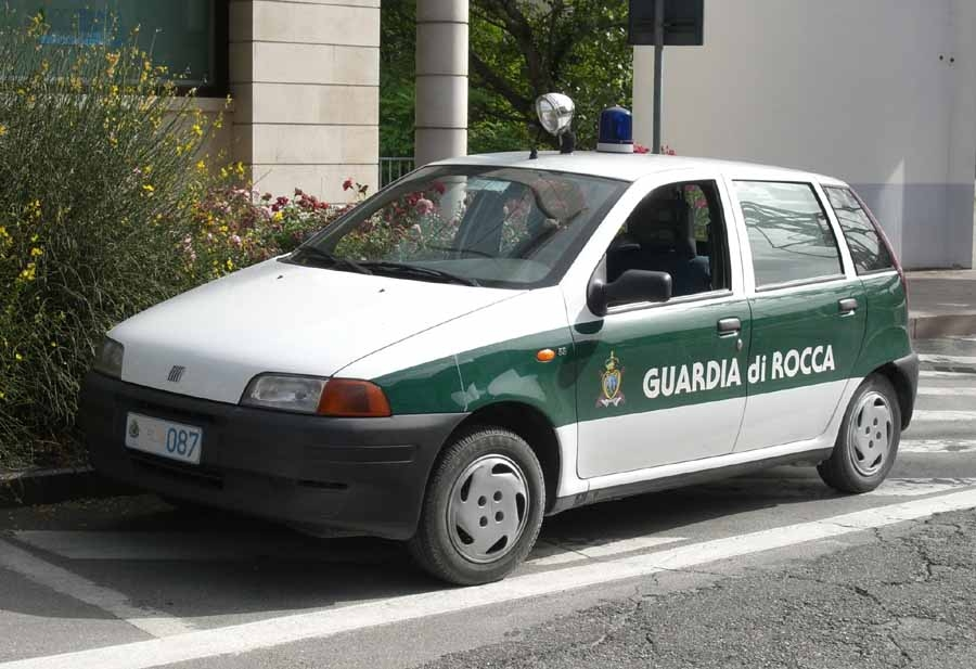 Fiat Punto della Guardia di Rocca.